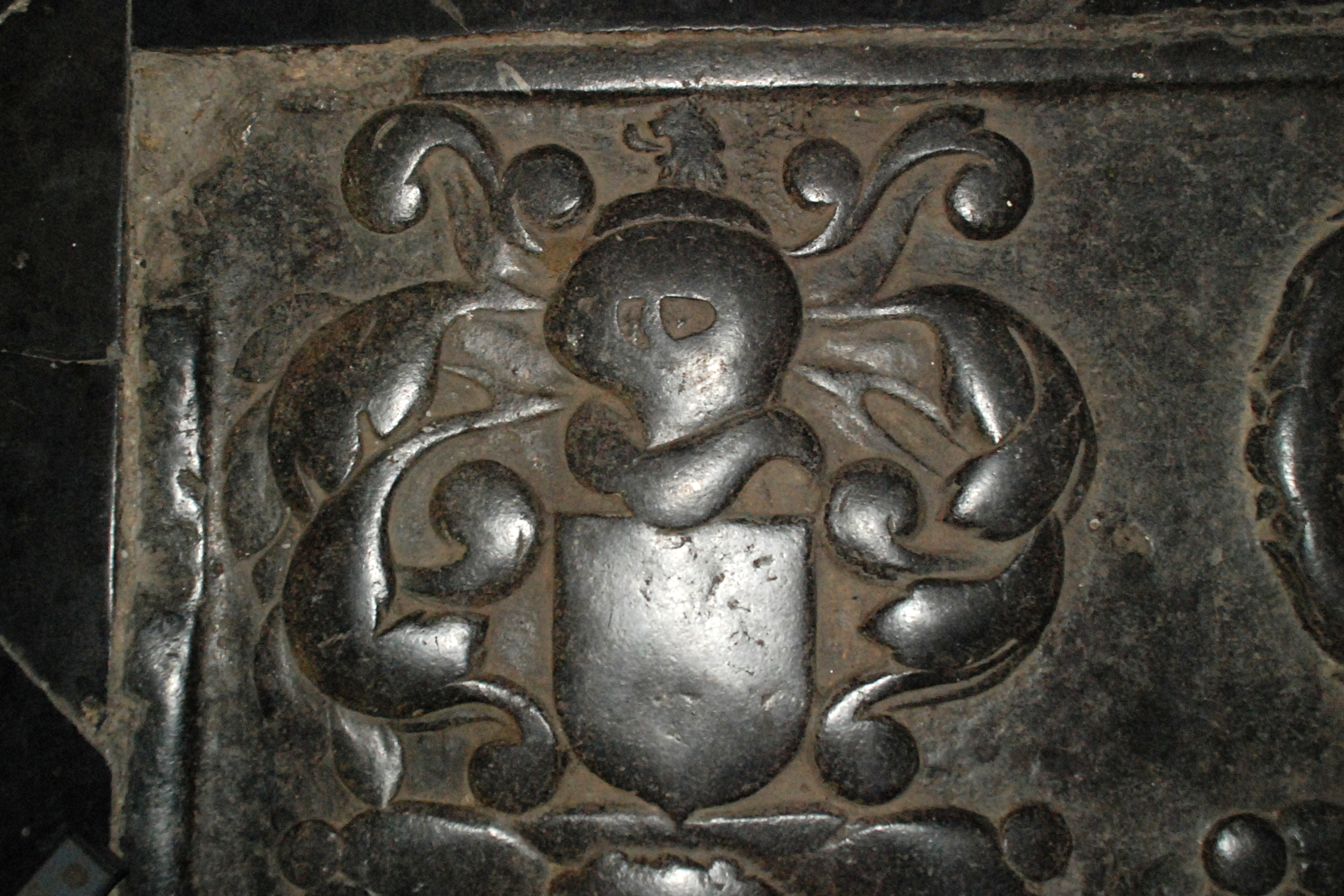 Belgique - Église Saint-Barthélemy de Bousval- dalle funéraire du capitaine Thierry Le Jeune